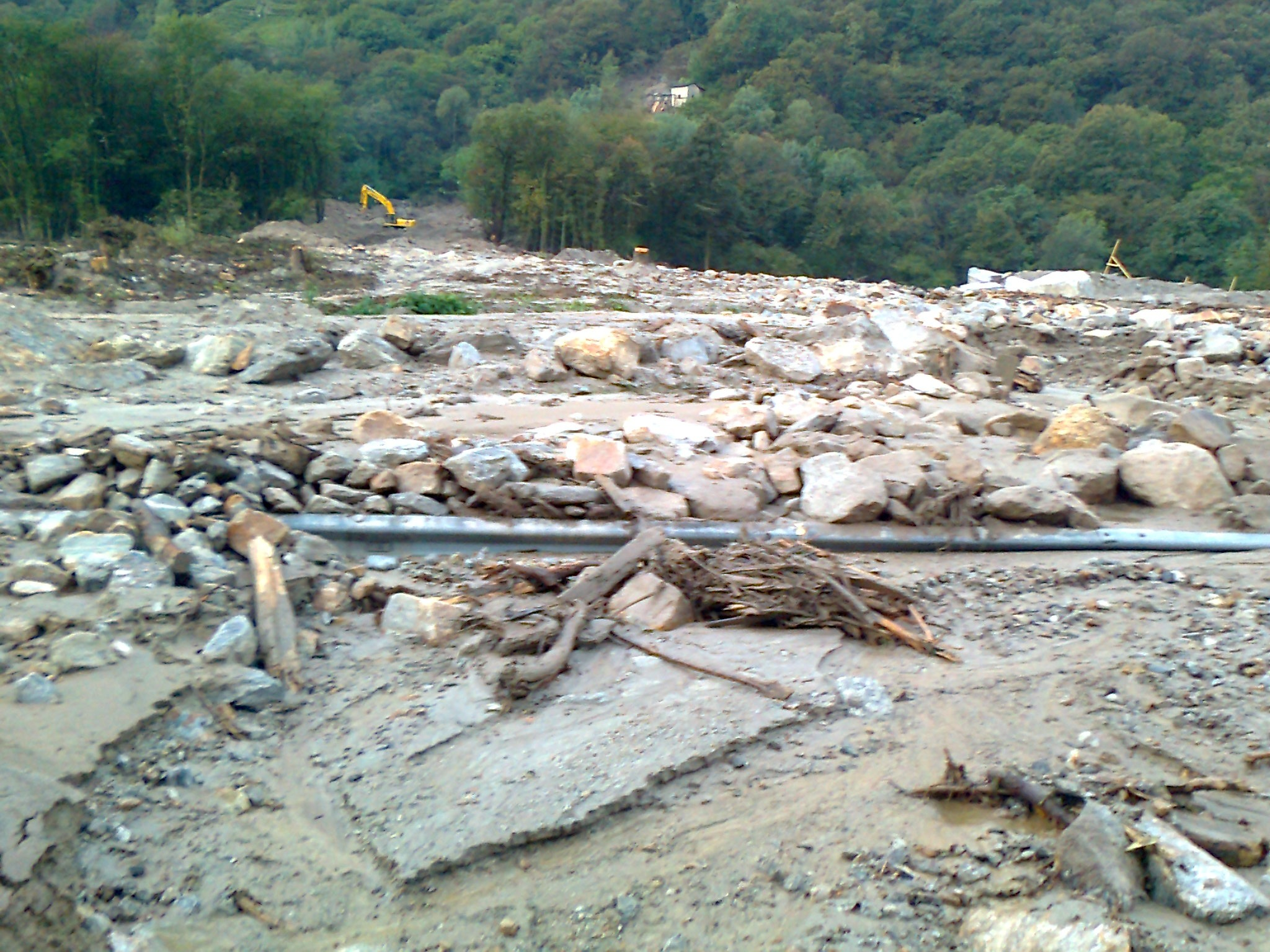 Strada cantonale (fuori dall'abitato) bloccata da un'alluvione del riale Pian Perdasc il 24.09.2012